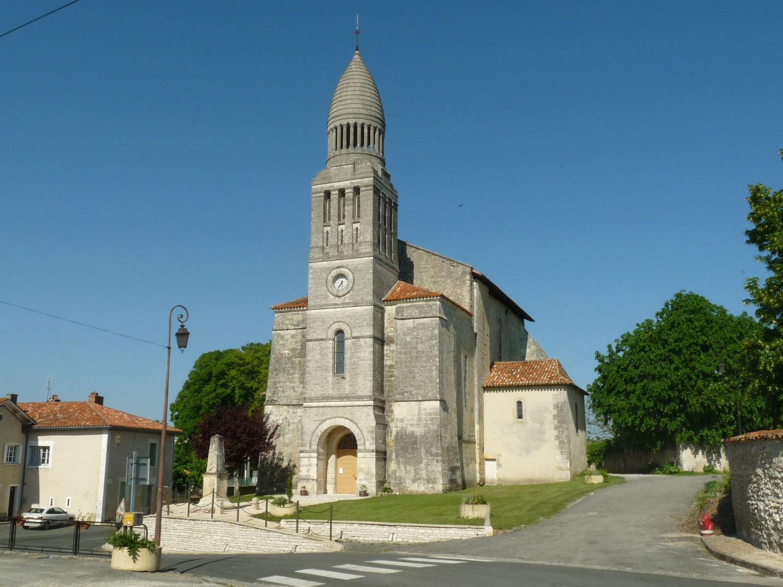 église d'Allemans, Dordogne, France